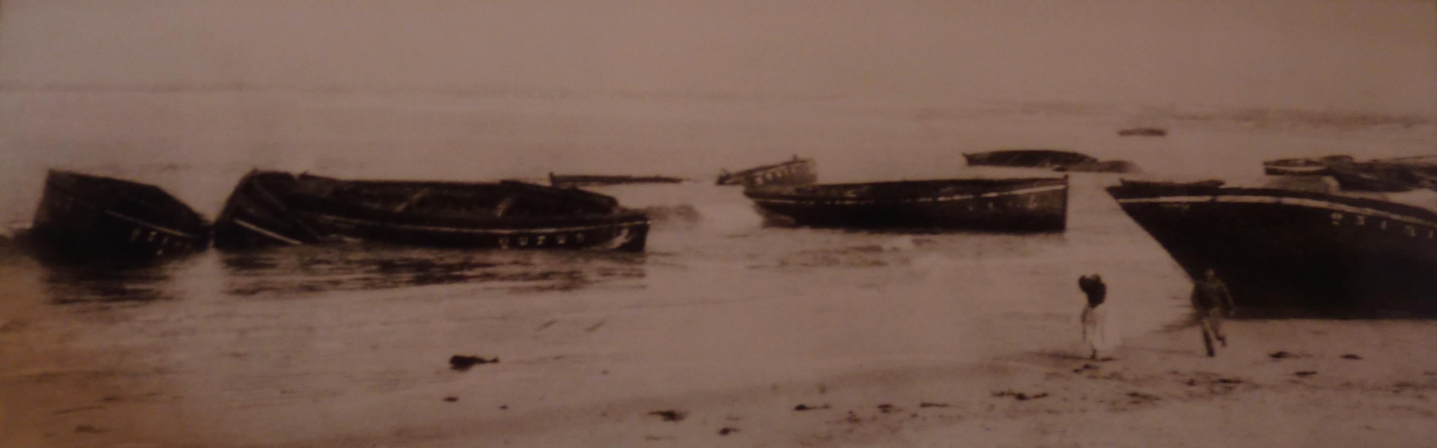 Penmarch : bateaux échoués sur la grève de Pors Carn après la tempête du 30 septembre 1912 (la tempête s'étant levée brutalement, une trentaine de bateaux de pêche ne purent regagngner leurs ports et tentèrent de trouver refuge dans la baie de Pors Carn où beaucoup coulèrent ou s'échouèrent sur la grève ; le canot de sauvetage sauva l'équipage du Boer en train de couler et sauva ensuite sept autres équipages de six à sept hommes ; en tout, cette tempête provoqua la perte d'une quarantaine de bataux)